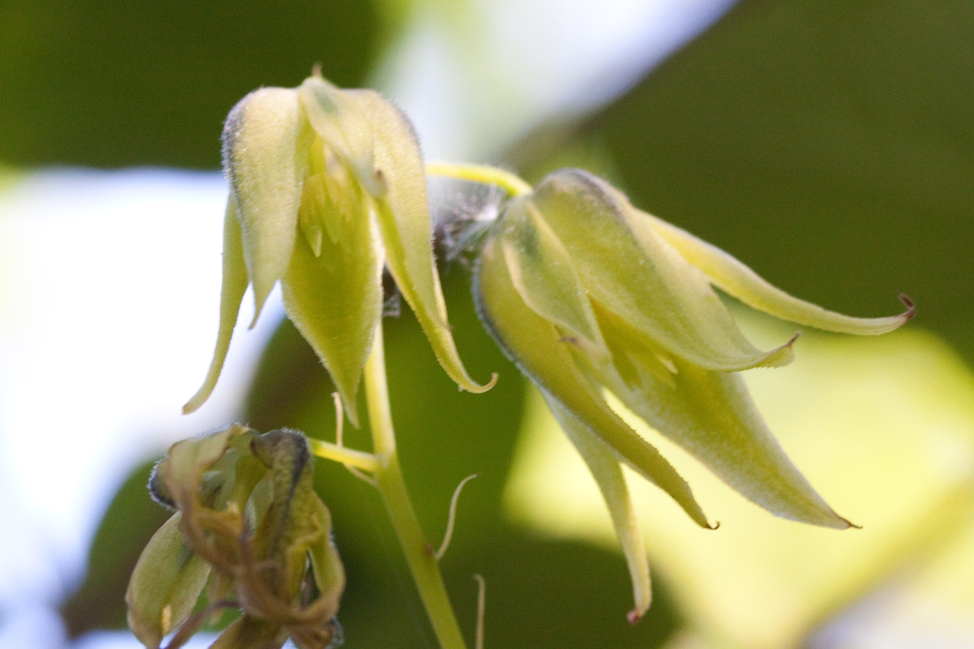 Fleurs de Decaisnea fargesii au Jardin botanique de Strasbourg - France Remarquer les trois carpelles de la fleur hermaphrodite ouverte.